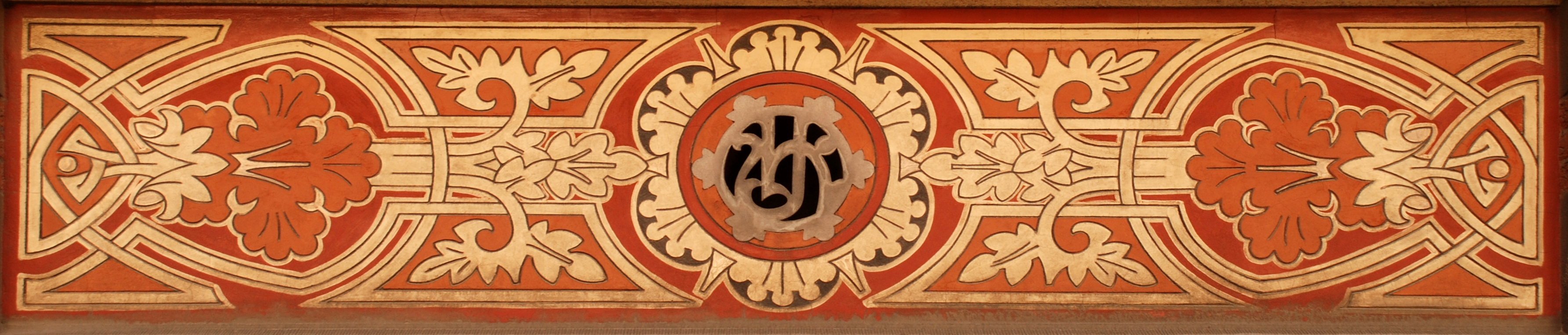 Belgique - Bruxelles - Maison Henri Jacobs